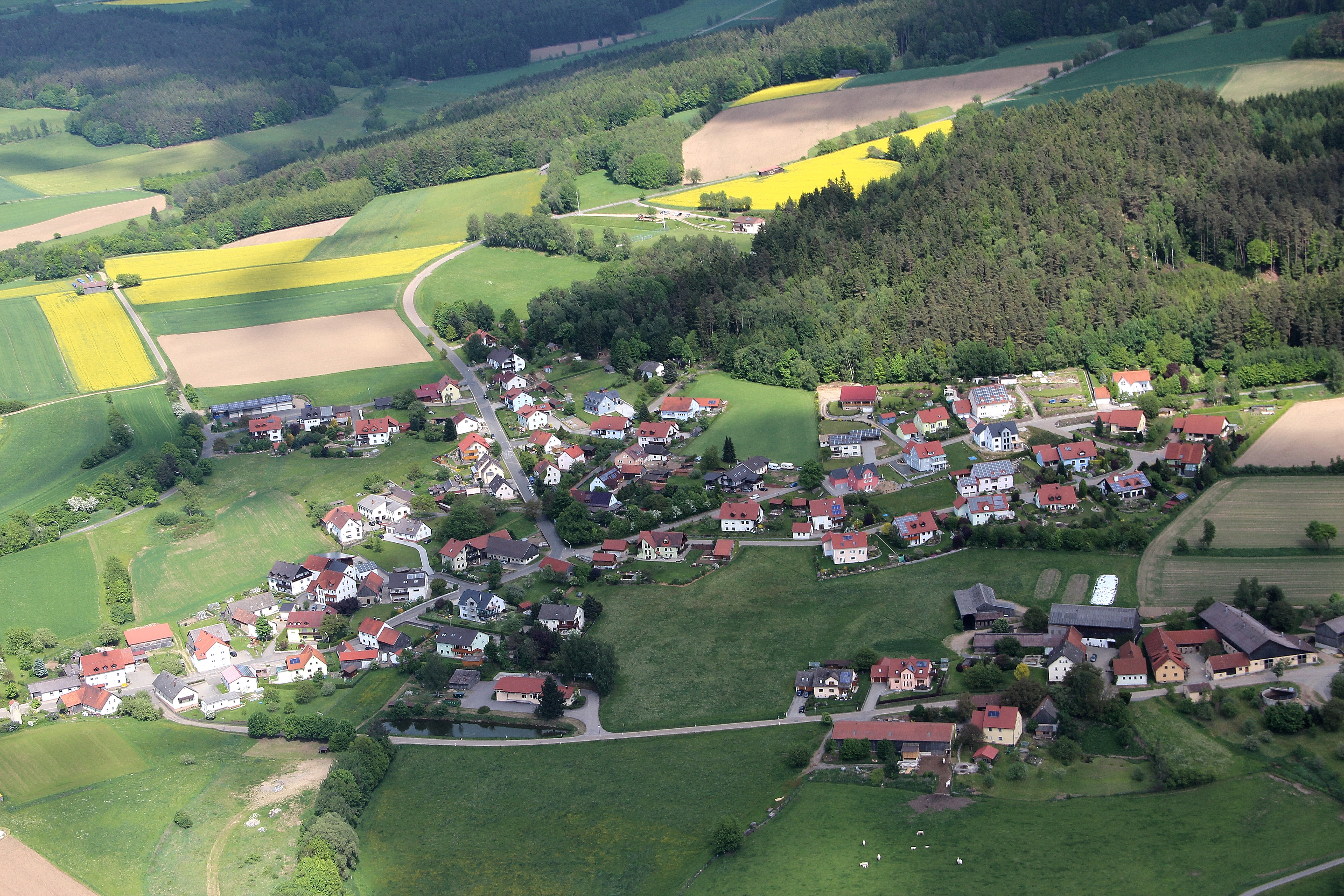 Gleiritsch, Baugebiet am Schlehenweg, rechts unten Steinach; Landkreis Schwandorf, Oberpfalz, Bayern